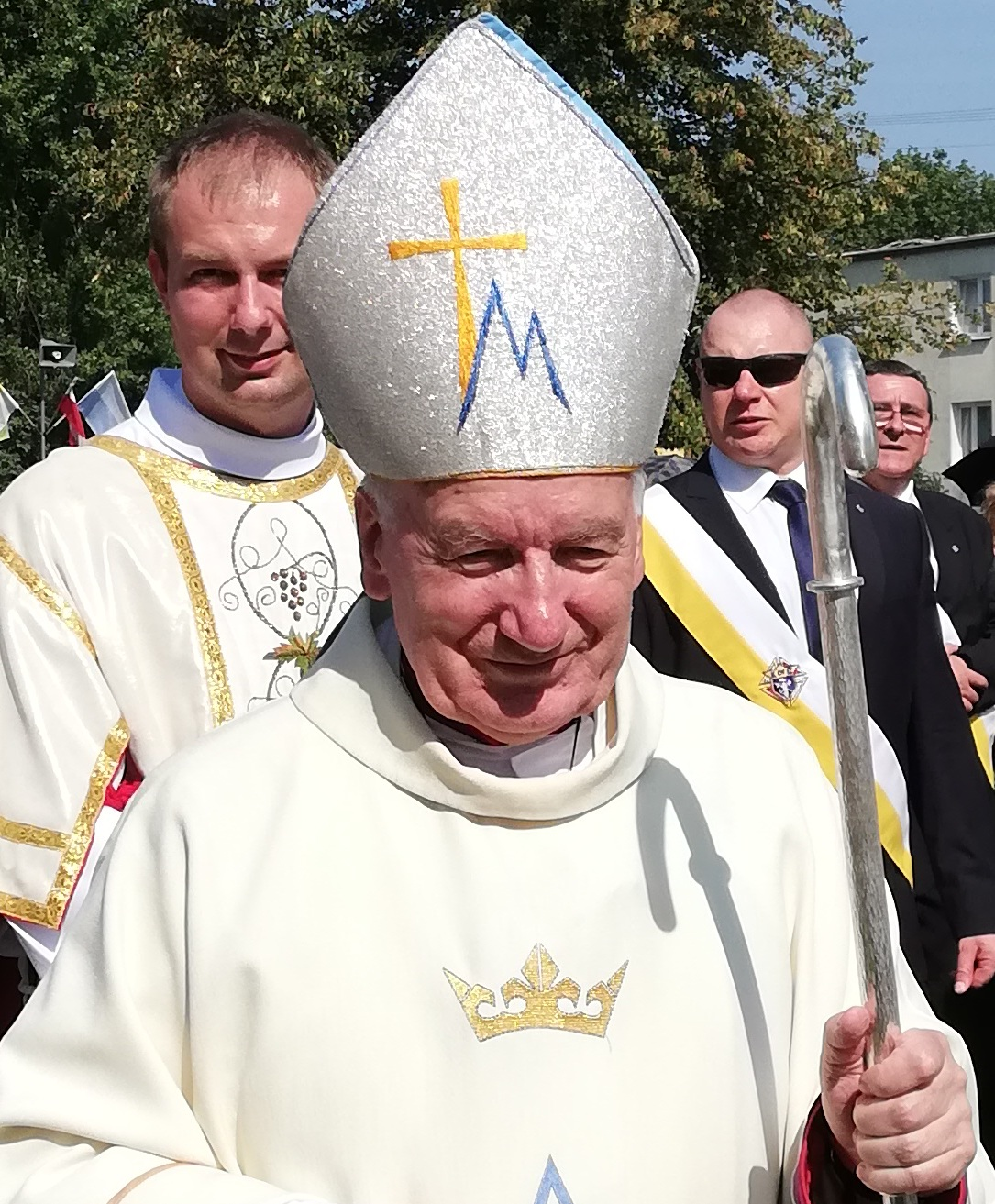 Bp Zdzisław Fortuniak podczas uroczystości odpustowych Narodzenia NMP w Tulcach, 1 września 2019